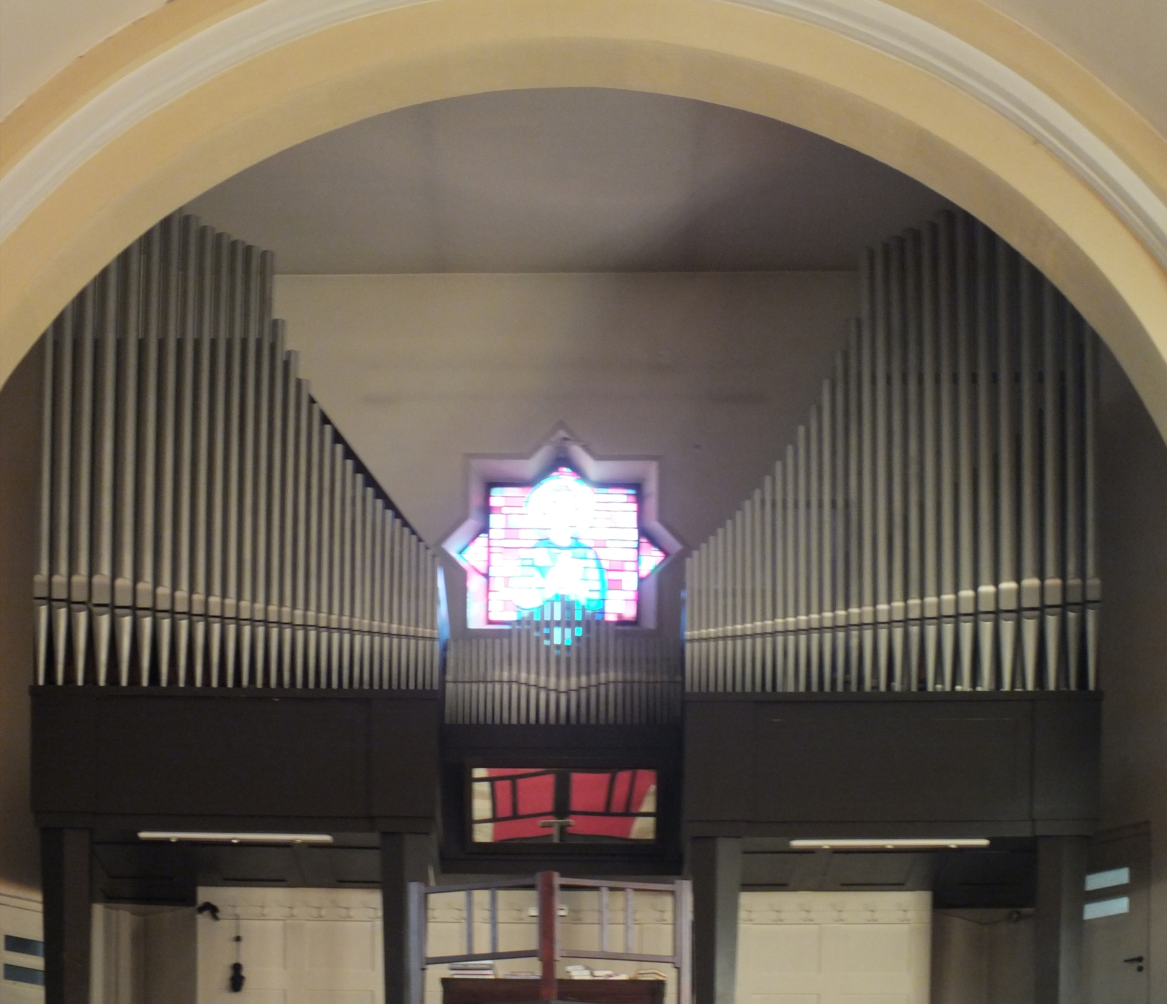 Kirche Maria Magdalena, Berlin-Niederschönhausen: Orgel